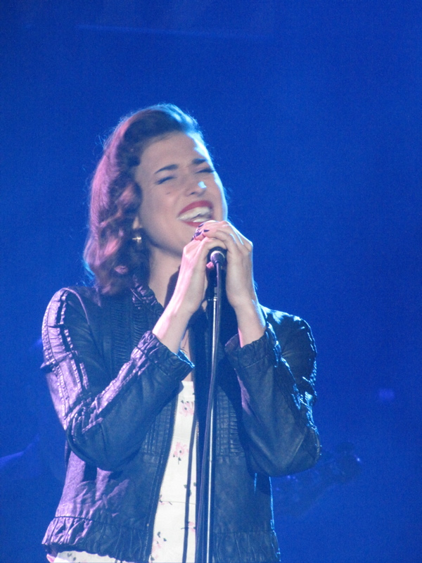 Lanie Lane